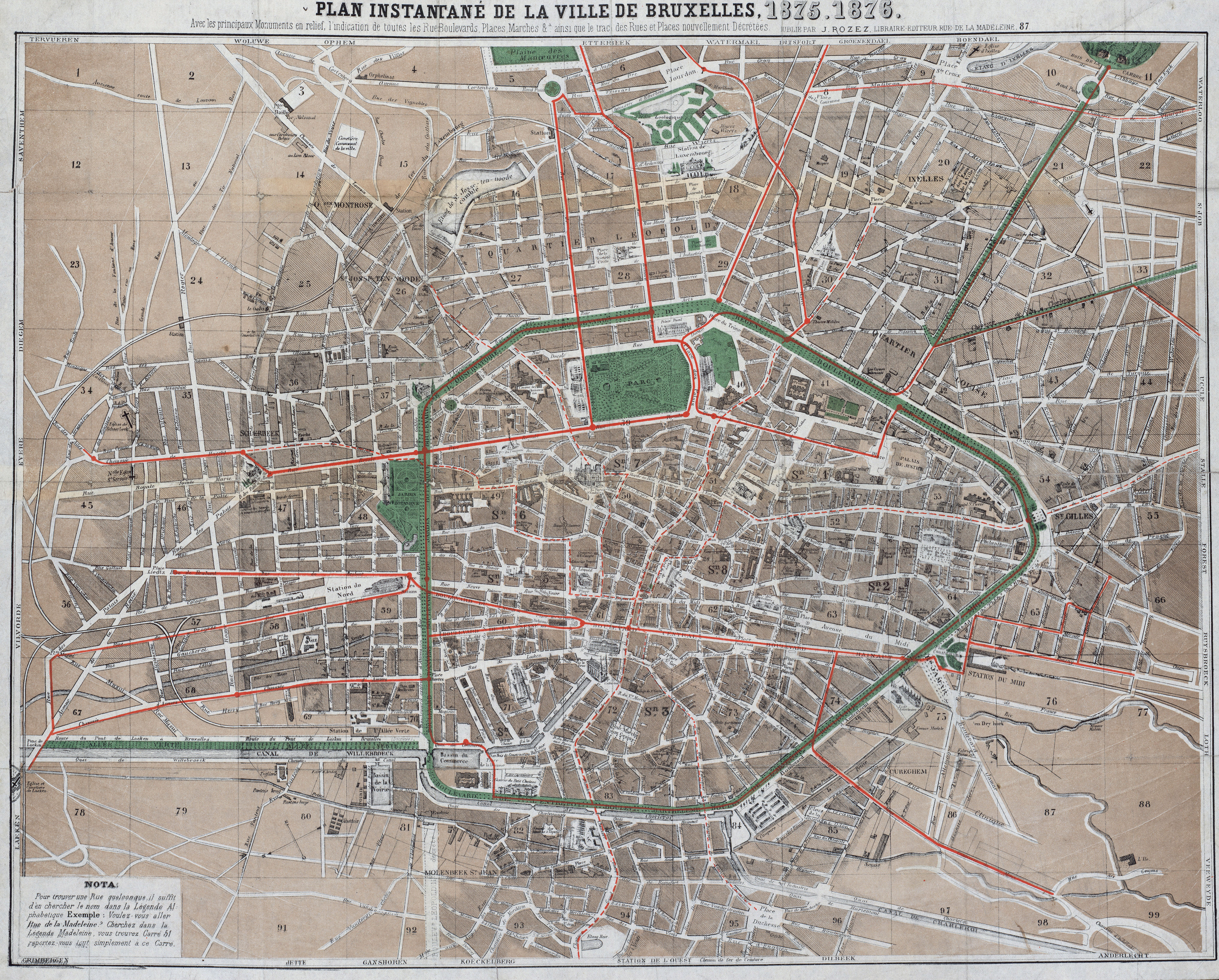 Kaart van Brussel 1875. 1876. Met bijgewerkte levels en kleuren. In het rood zijn de Brusselse paardentramlijnen van de TB (Les Tramways Bruxellois). De gestippelde rode lijnen zijn die van de CFE (Les Chemins Général de Fer Economiques).